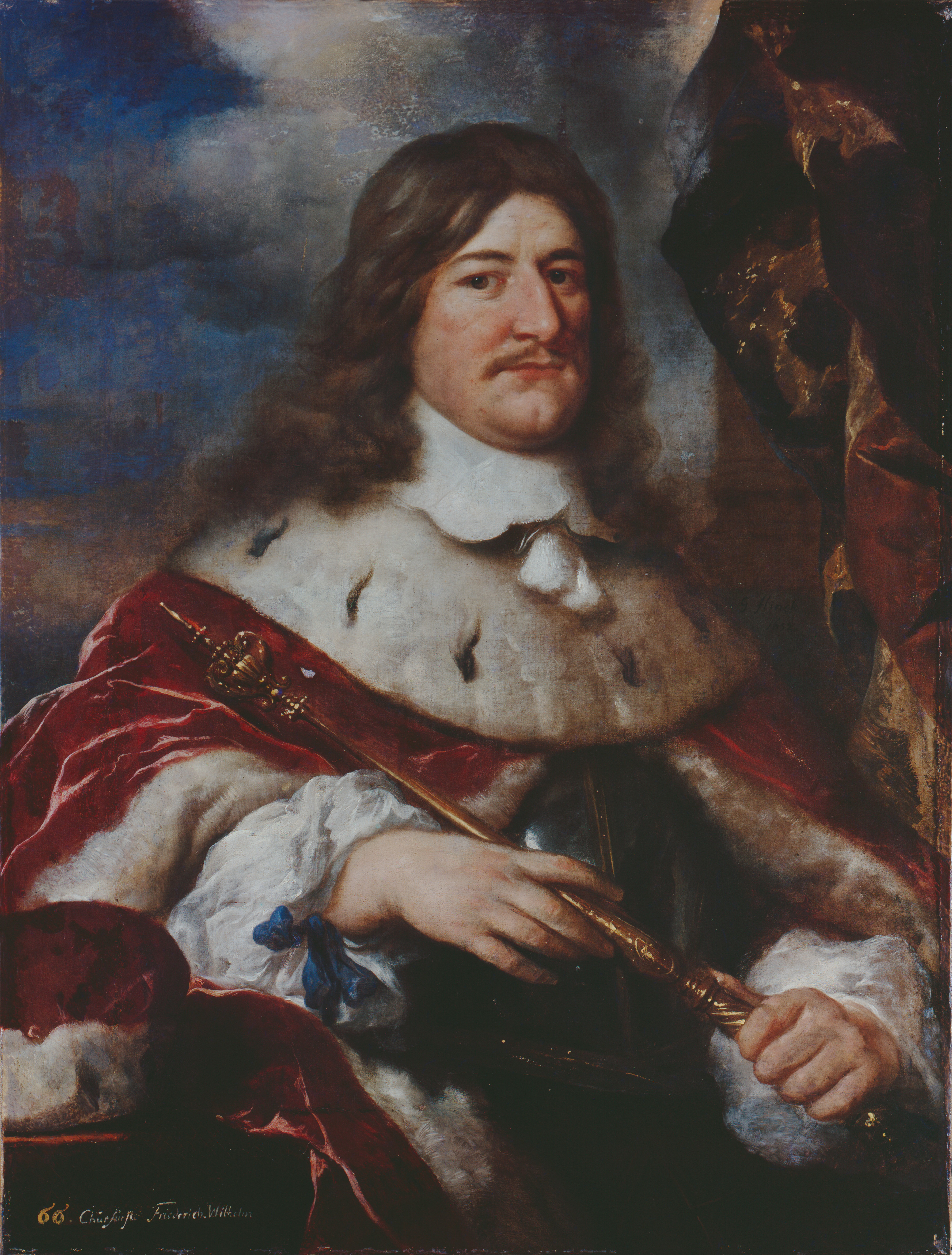 Friedrich Wilhelm von Brandenburg, der Große Kurfürst im Harnisch und Kurmantel.